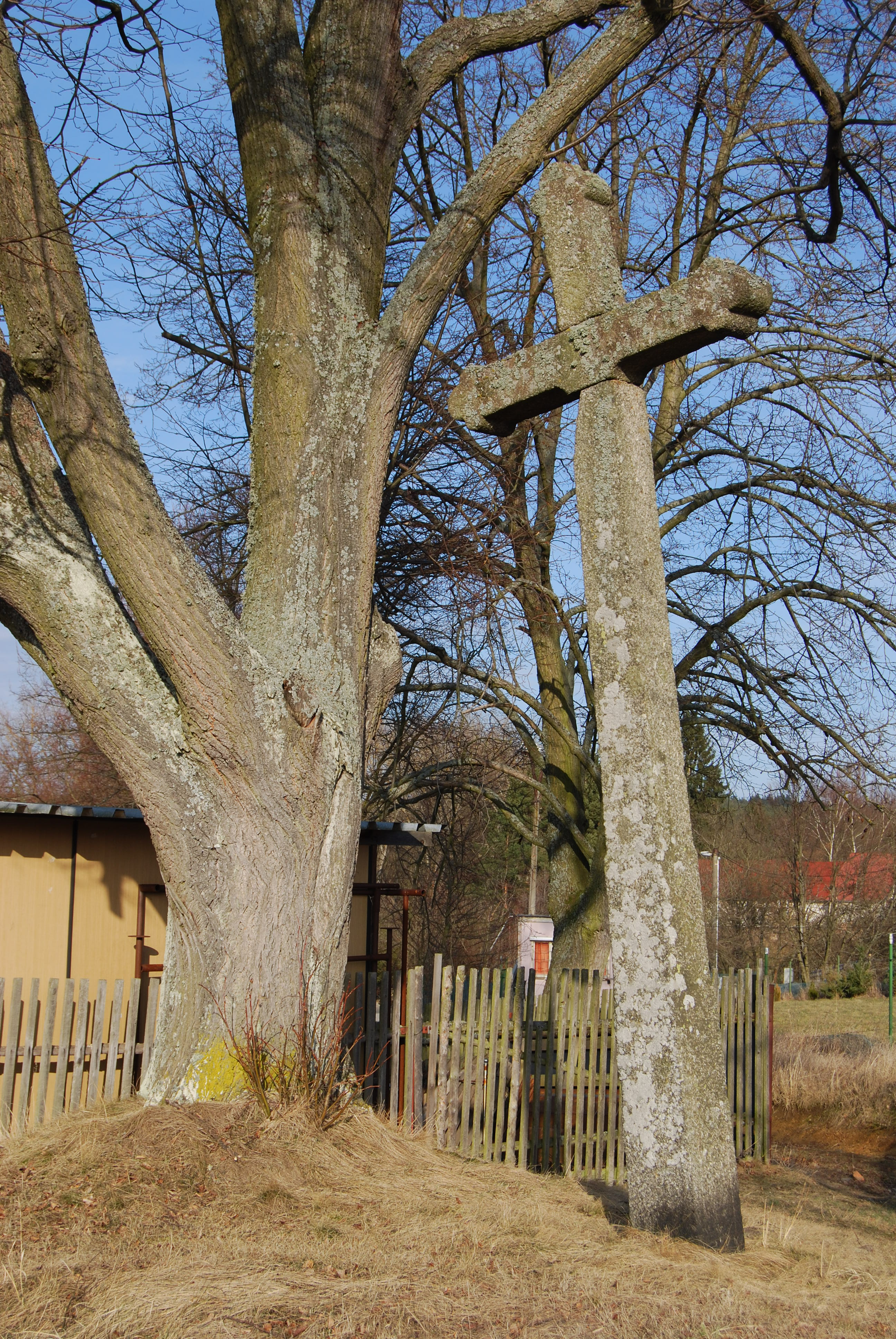 Kamenný kříž na jižním okraji obce. Olešná (okres Písek). Česká republika.